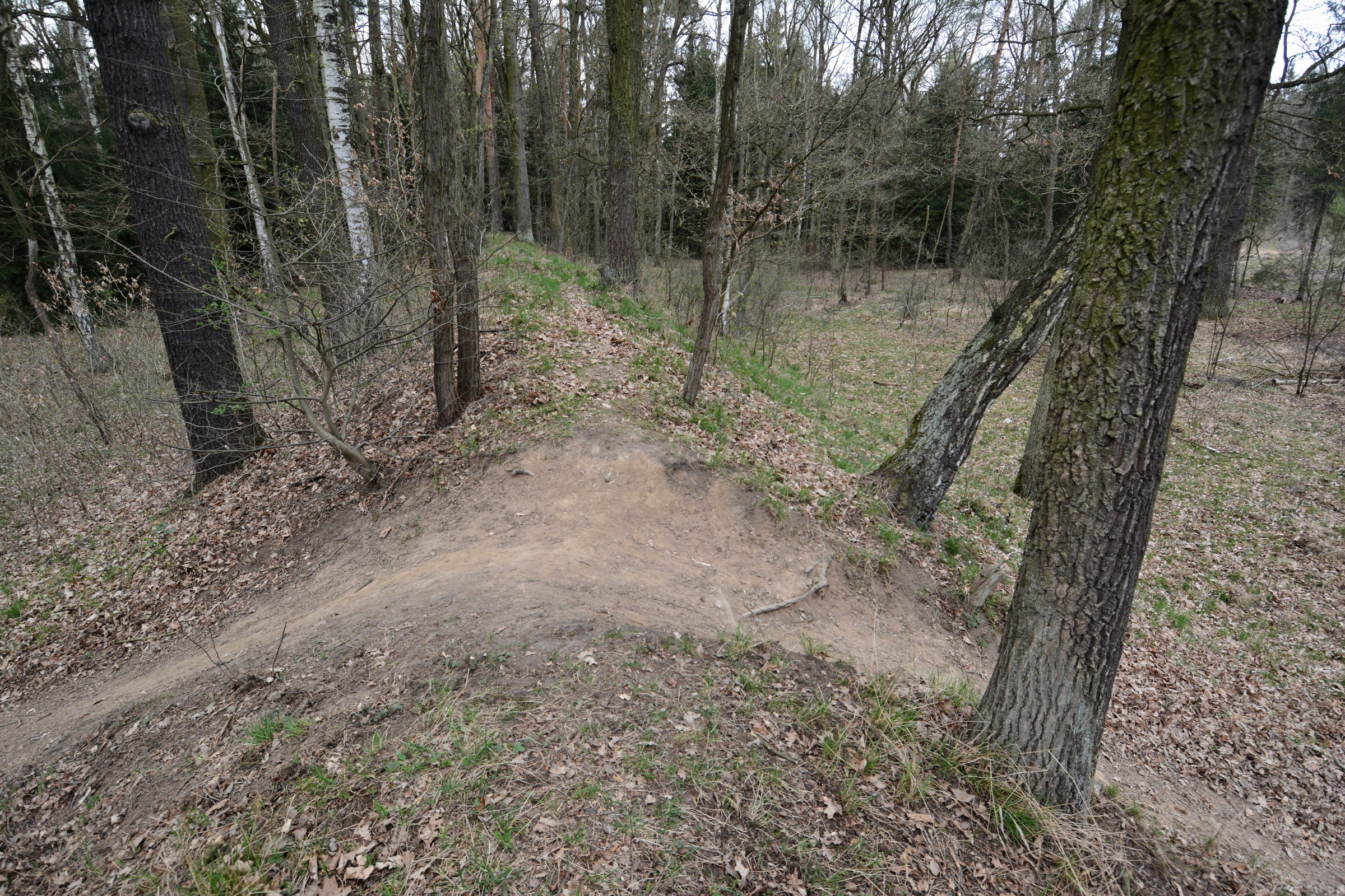 Zaniklý rybník Žák v Klánovickém lese. Pozůstatky hráze.